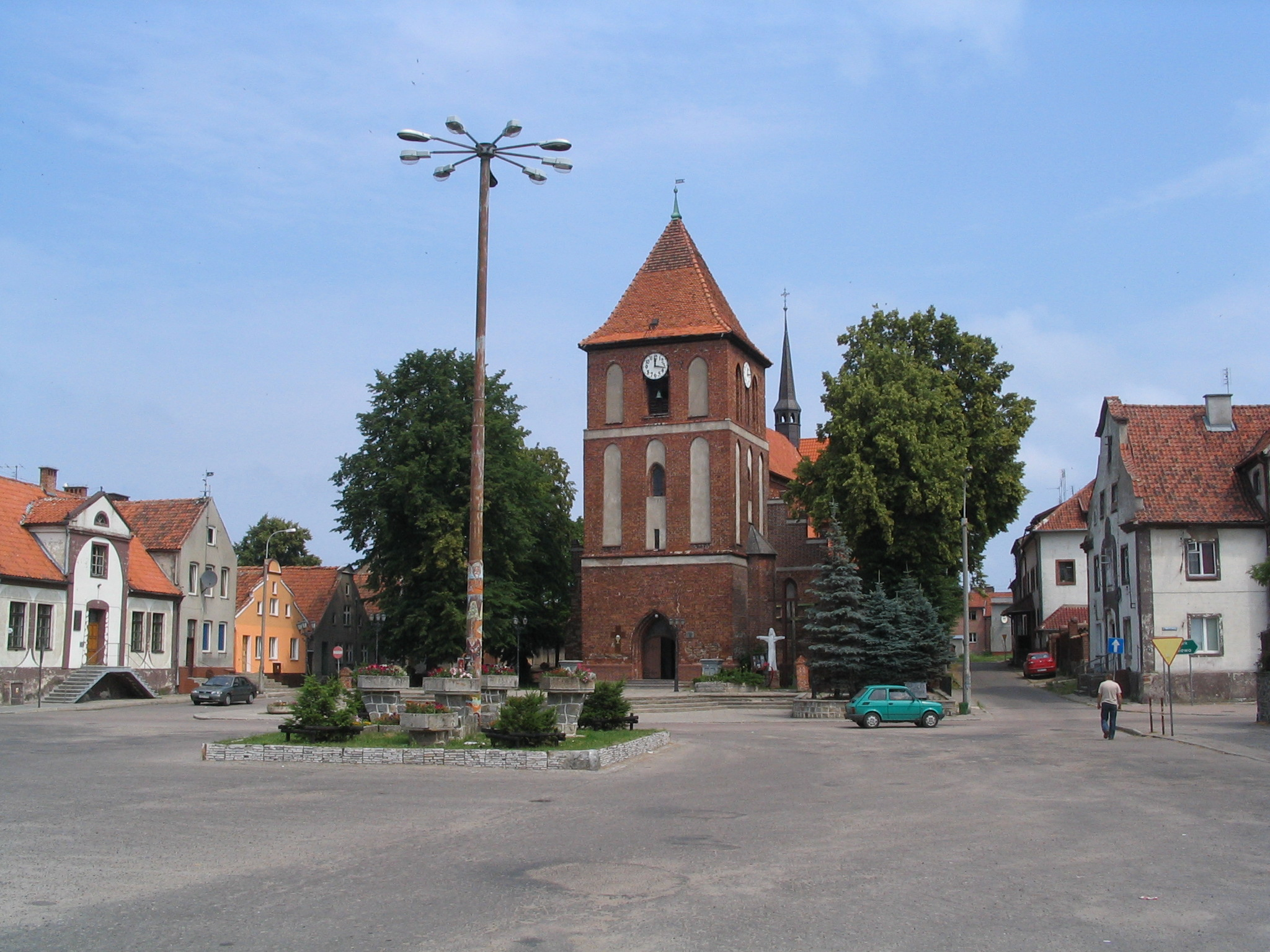 Tolkmicko, centrum